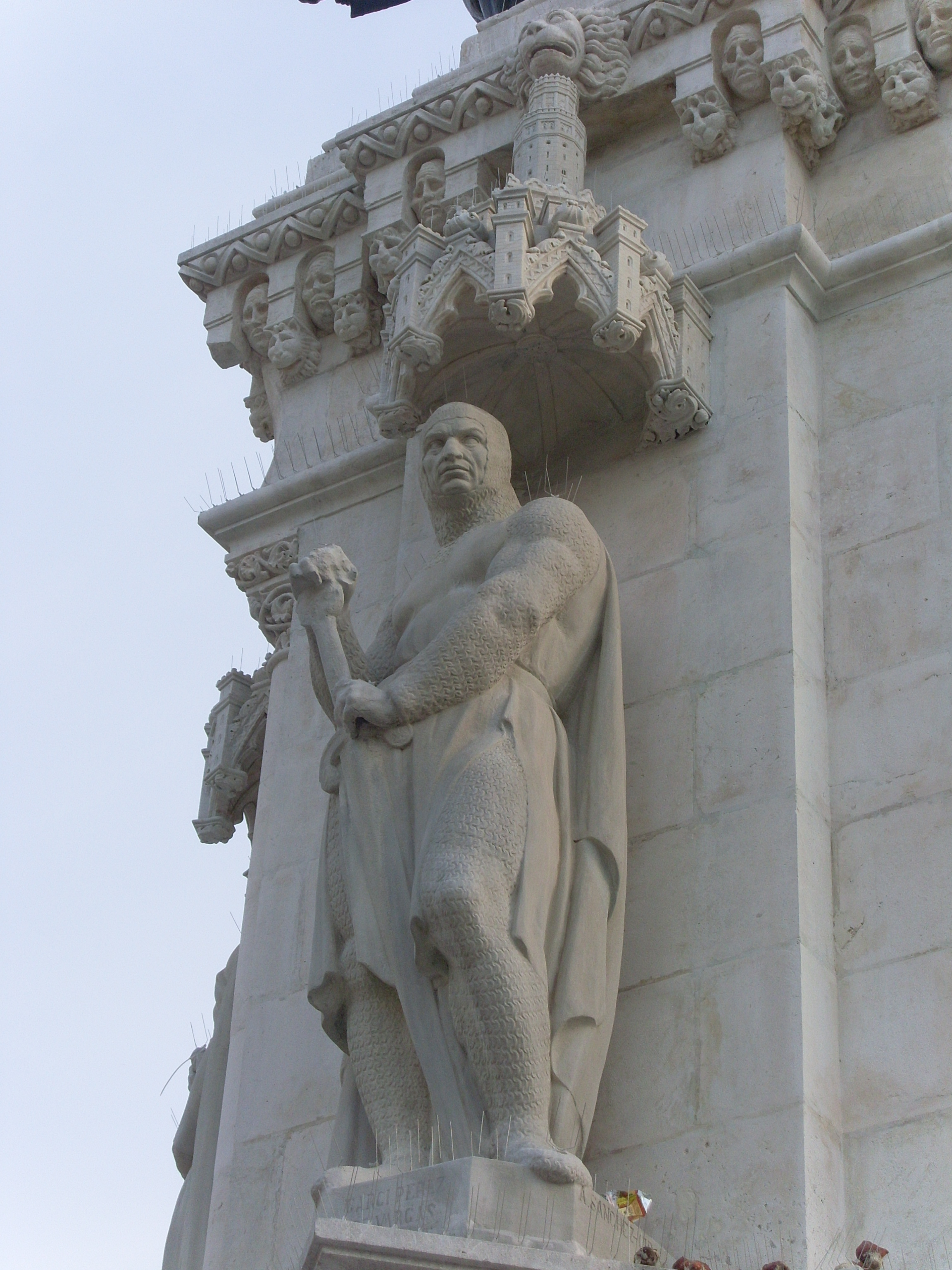 Estatua de Garci Pérez de Vargas en la Plaza Nueva.